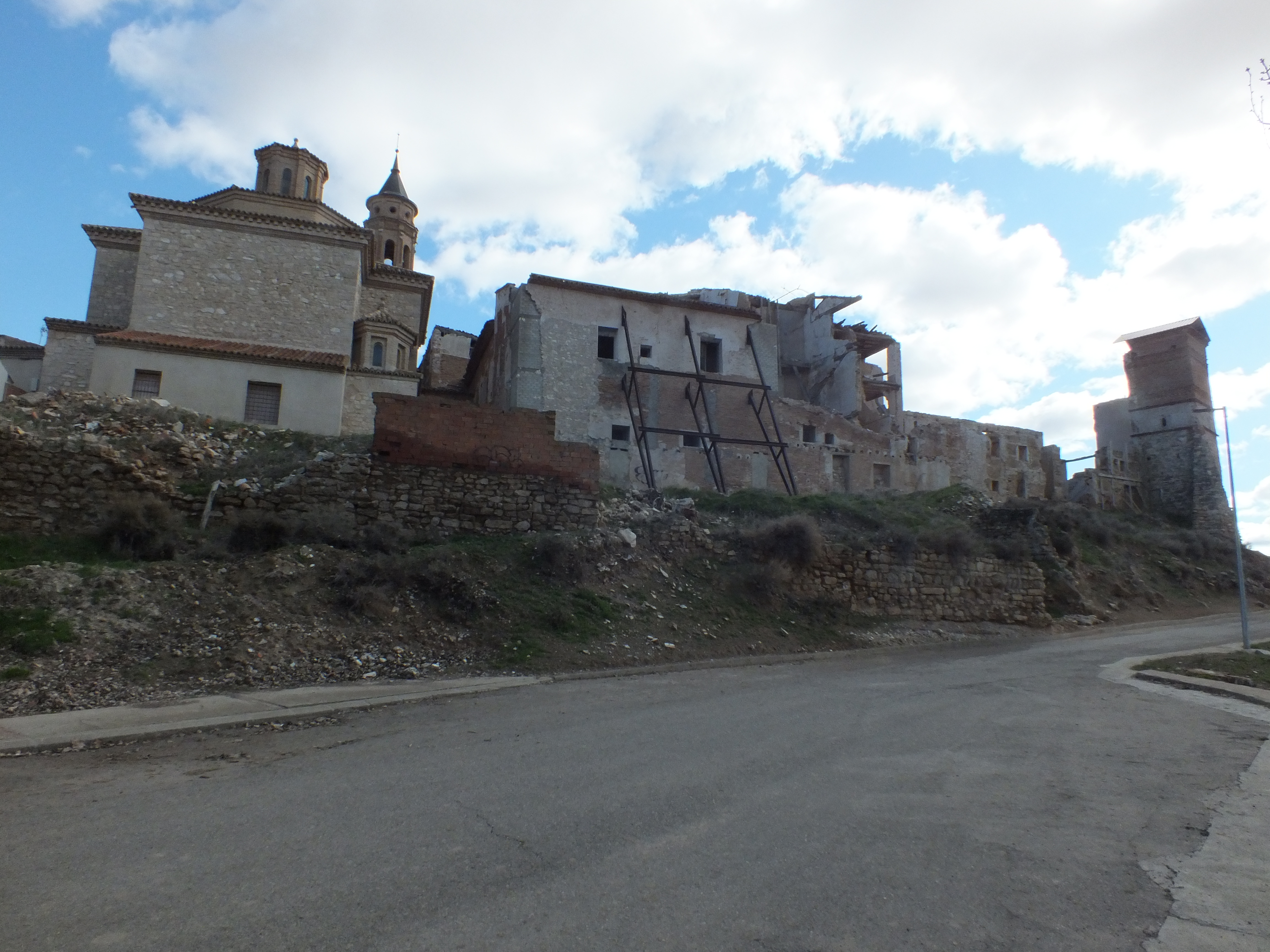 Conjunto histórico de Letux